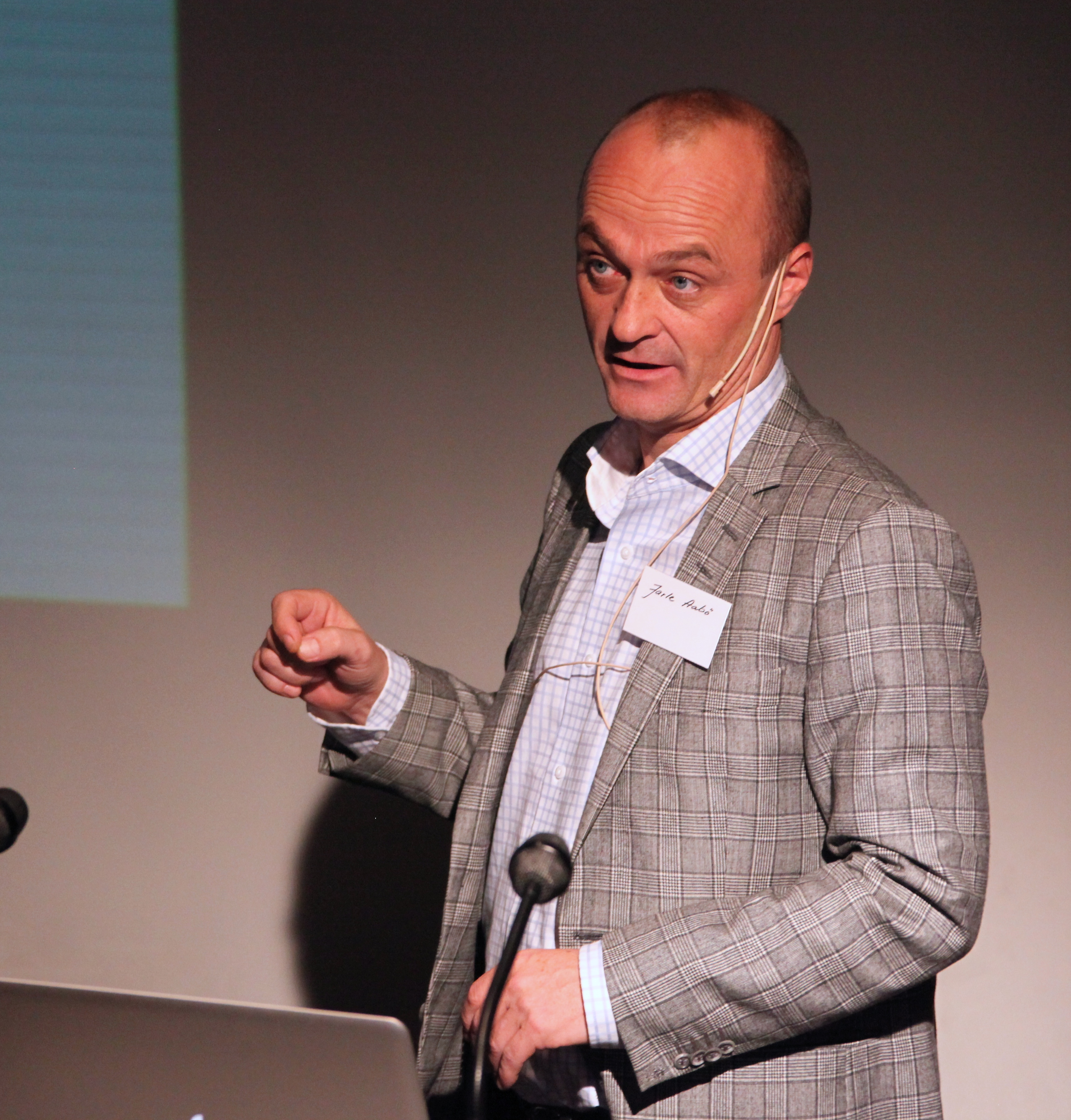 Wikipedia Academy, Jarle Aabø